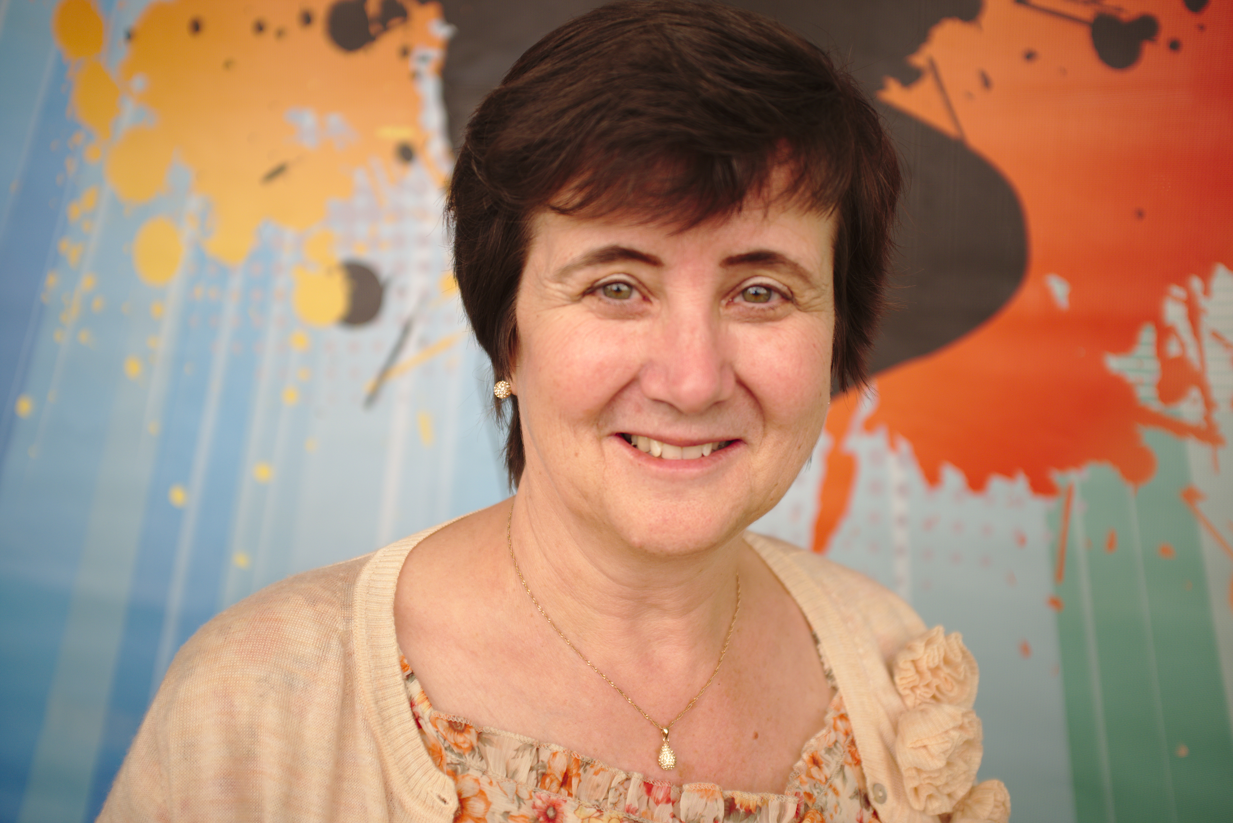 Nicola Vollkommer auf dem DünenhofFestival 2018 in Cuxhaven